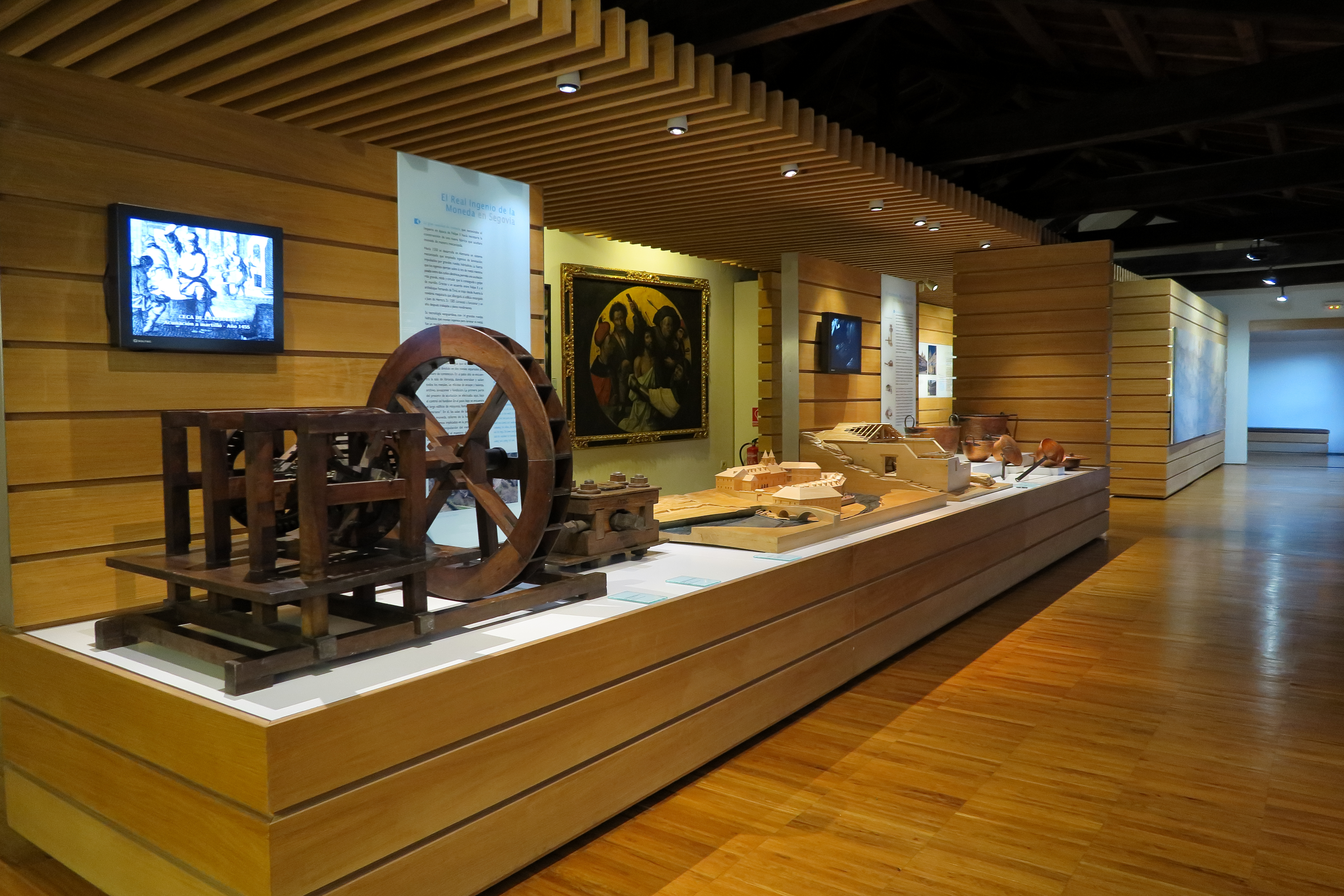 Museo de Segovia, maqueta de el Real Ingenio de la Moneda